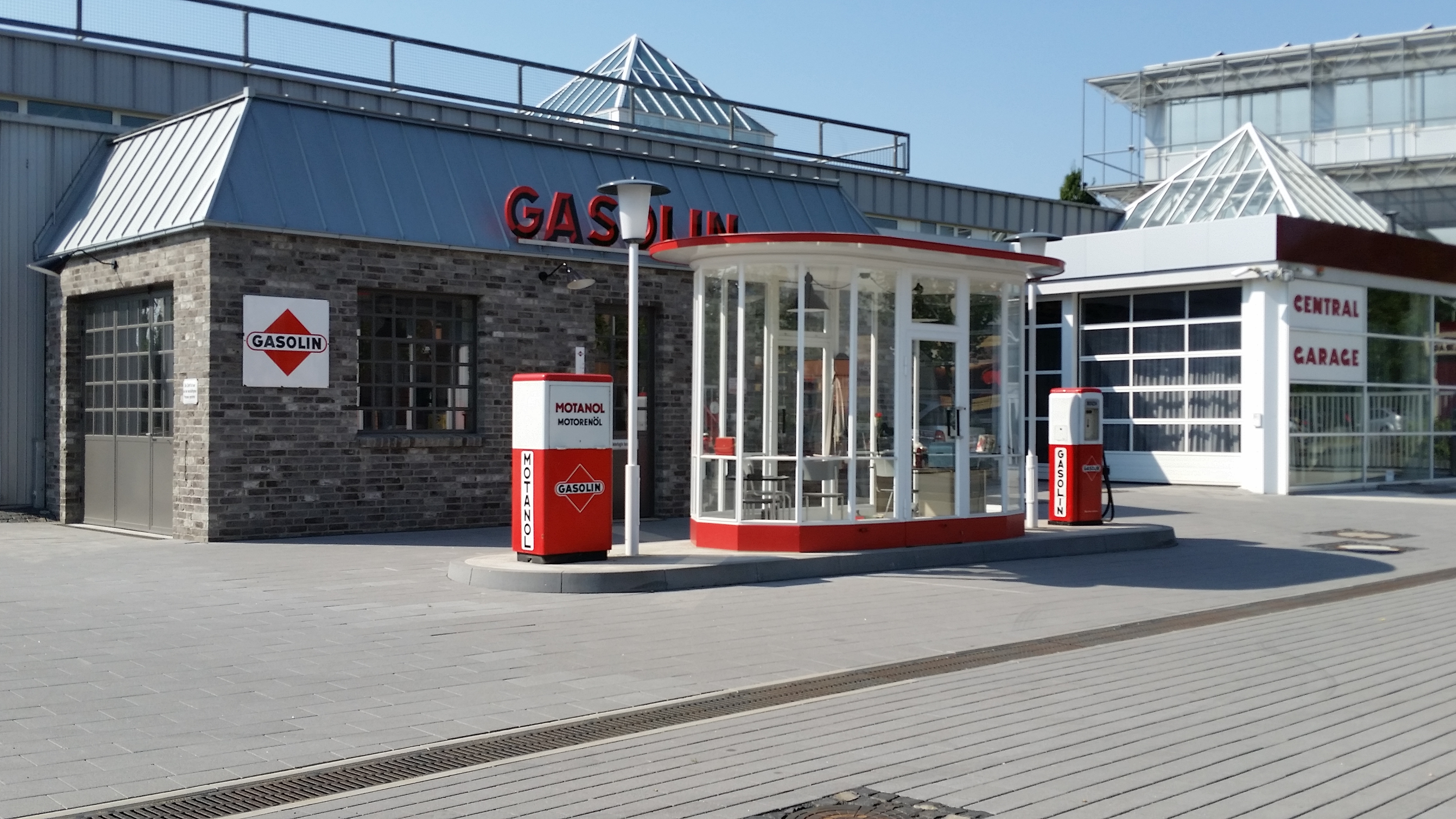 Im Mai 2015 wurde diese Tankstelle eröffnet als Nachbau bzw. Restauration. Das Tankwarthäuschen wurde 2013 in einem Garten entdeckt und restauriert. Originale Ausstattung wurde ergänzt - nur tanken ist nicht möglich. Webseite des Museums[1] und Artikel in der Frankfurter Rundschau vom 7. Januar 2016[2]